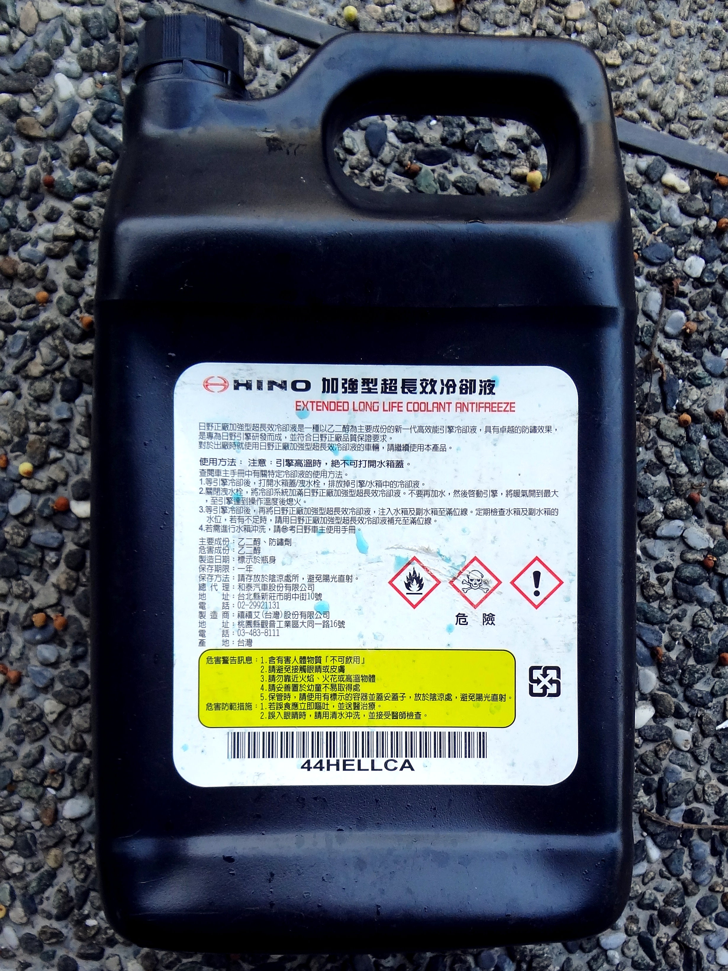 和泰汽車委外製造的日野正廠加強型超長效冷卻液。